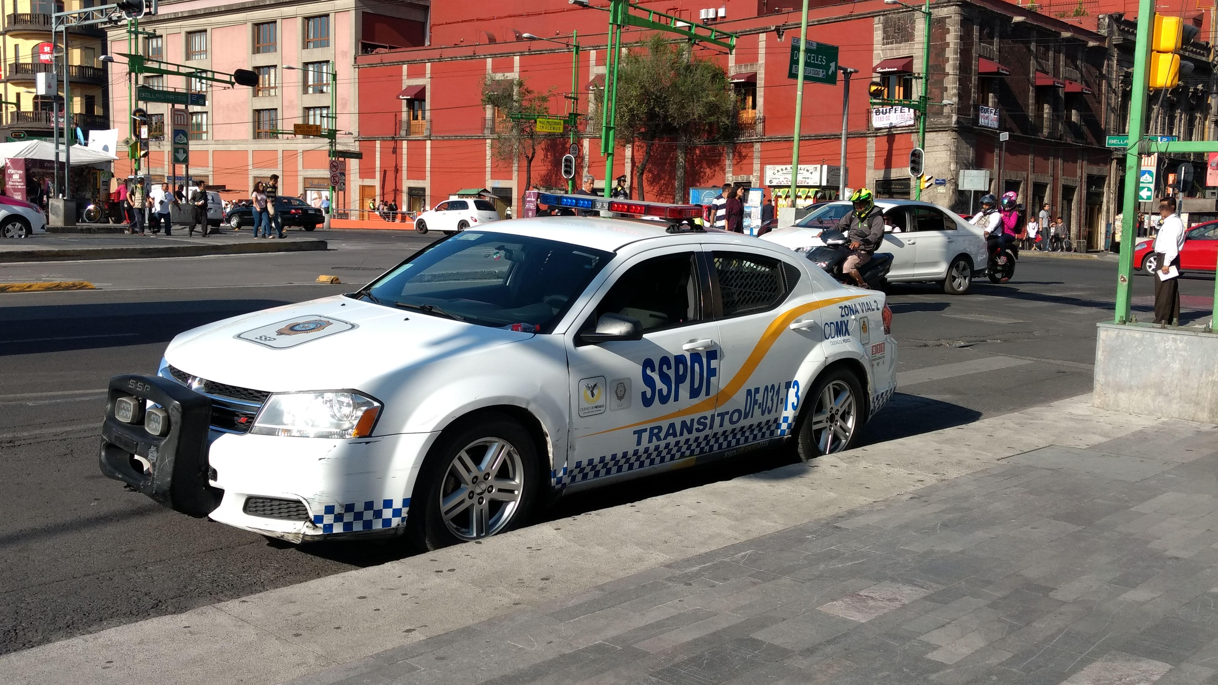 A Mexico City Transit Police parked at Hidalgo Avenue, in front of Bellas Artes Palace. Downtown Mexico City.